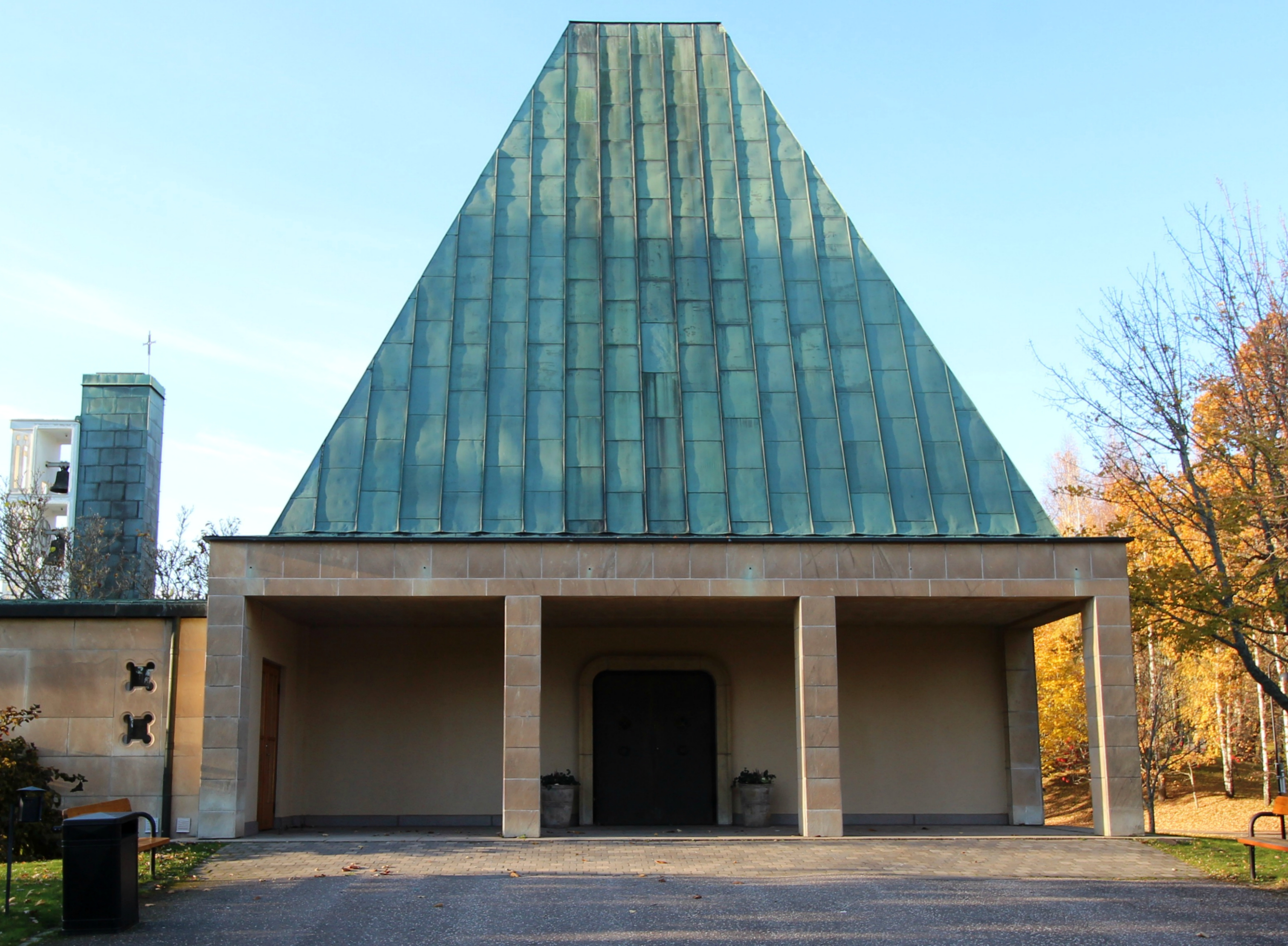 Heliga korsets kapell i Motala, Östergötland